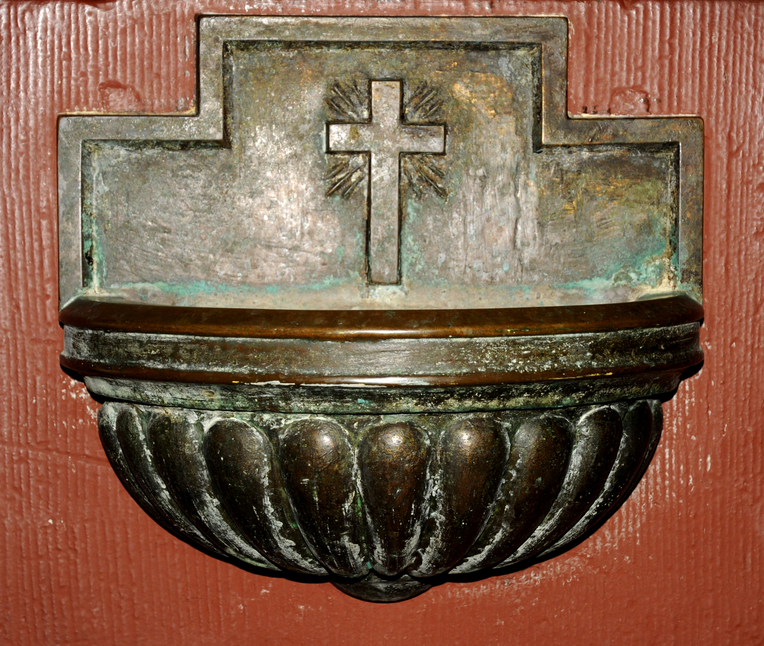 Wäiwaasserdëppchen an der Parkierch zu Diddeleng.